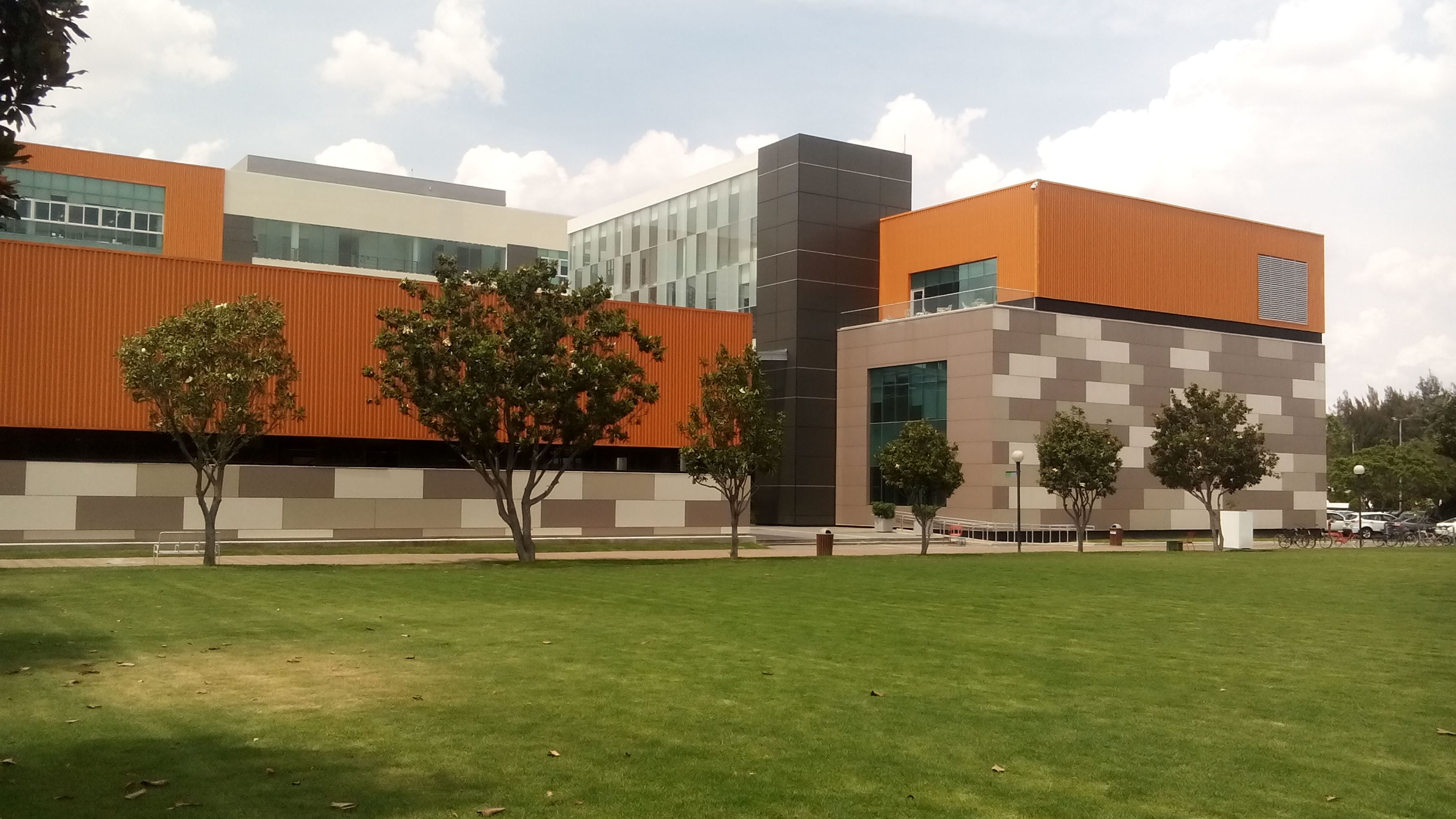 Foto tomada en el día donde se encuentra el edificio donde se imparten las ingenierías en el Tec de Monterrey campus Guadalajara.